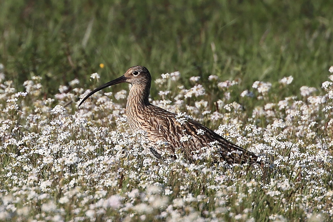 Großer Brachvogel im Unteren Isartal bei Moosthenning (Special Protection Area Number DE7341471, Königsauer Moos)